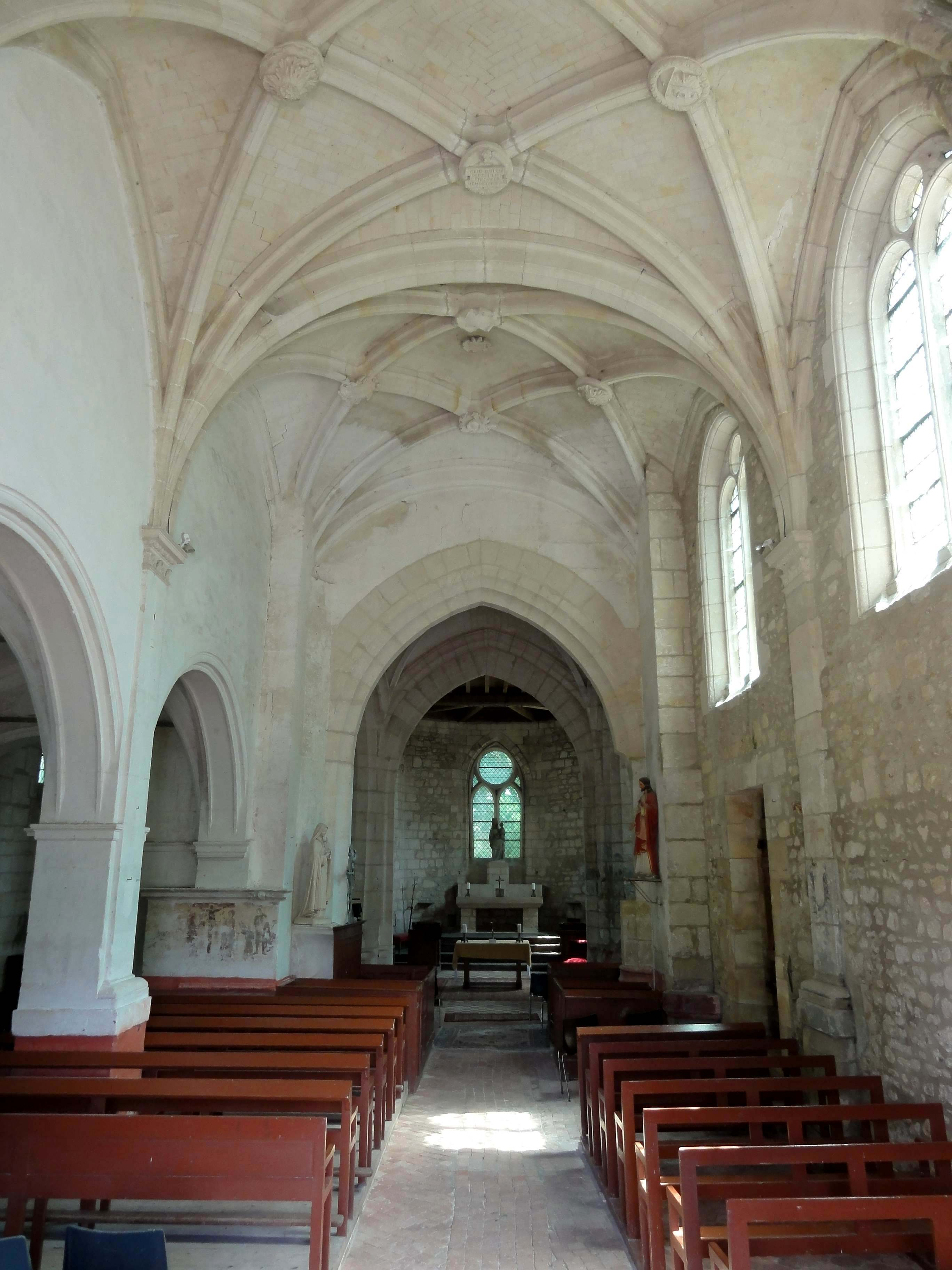 Intérieur de l'église (voir titre).